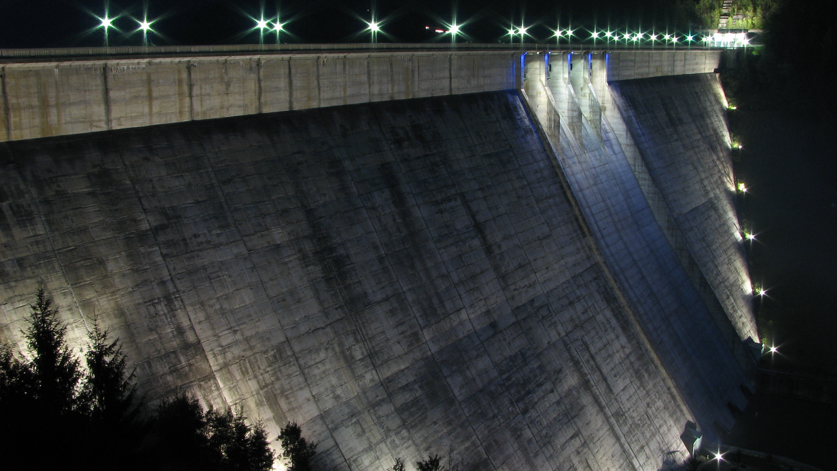 Barajul Bicaz, RomaniaBicaz Dam